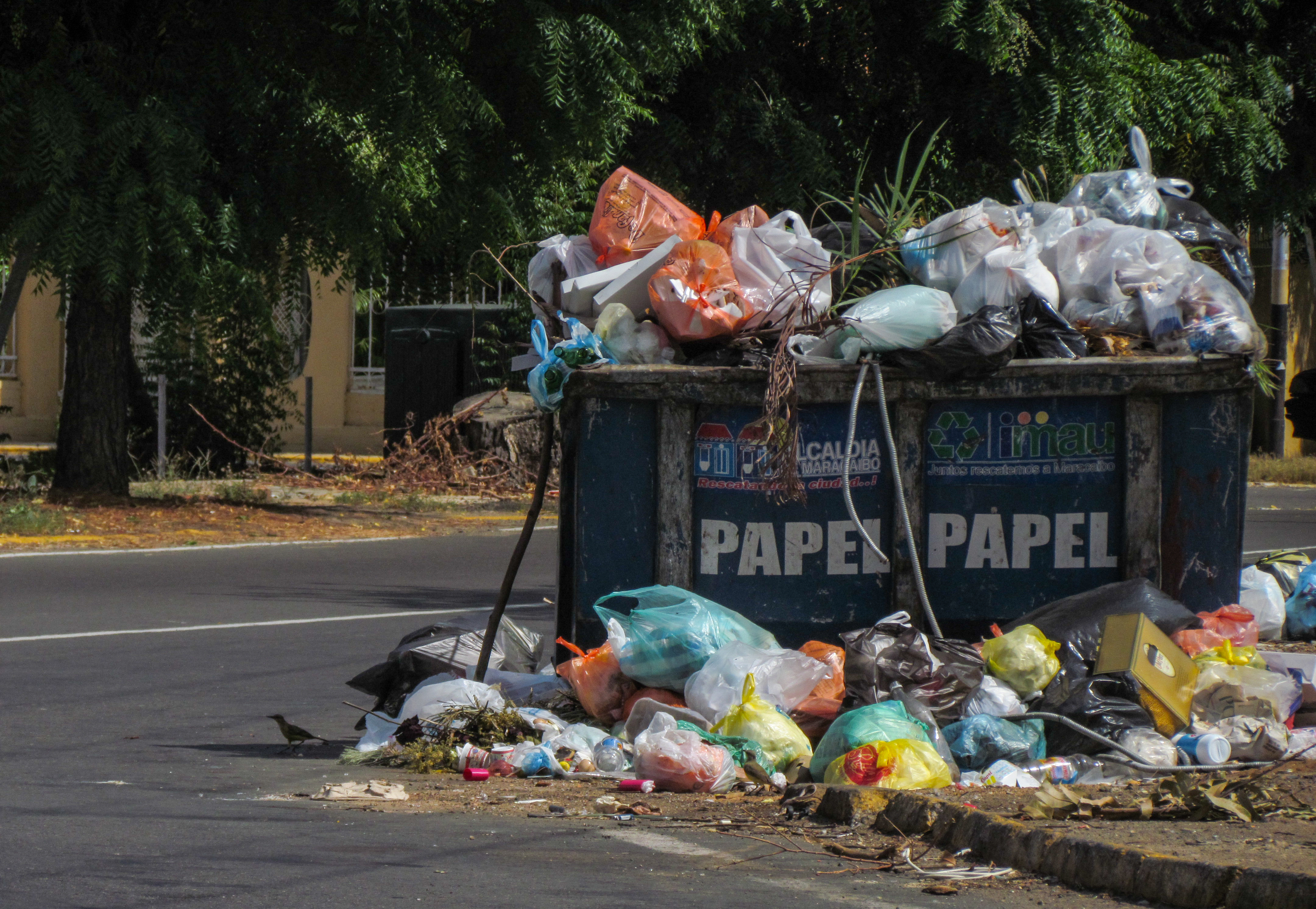 Es común observar este tipo de contaminación en las calles de Maracaibo, en este caso la Urb. La Trinidad, Estado Zulia, Venezuela.